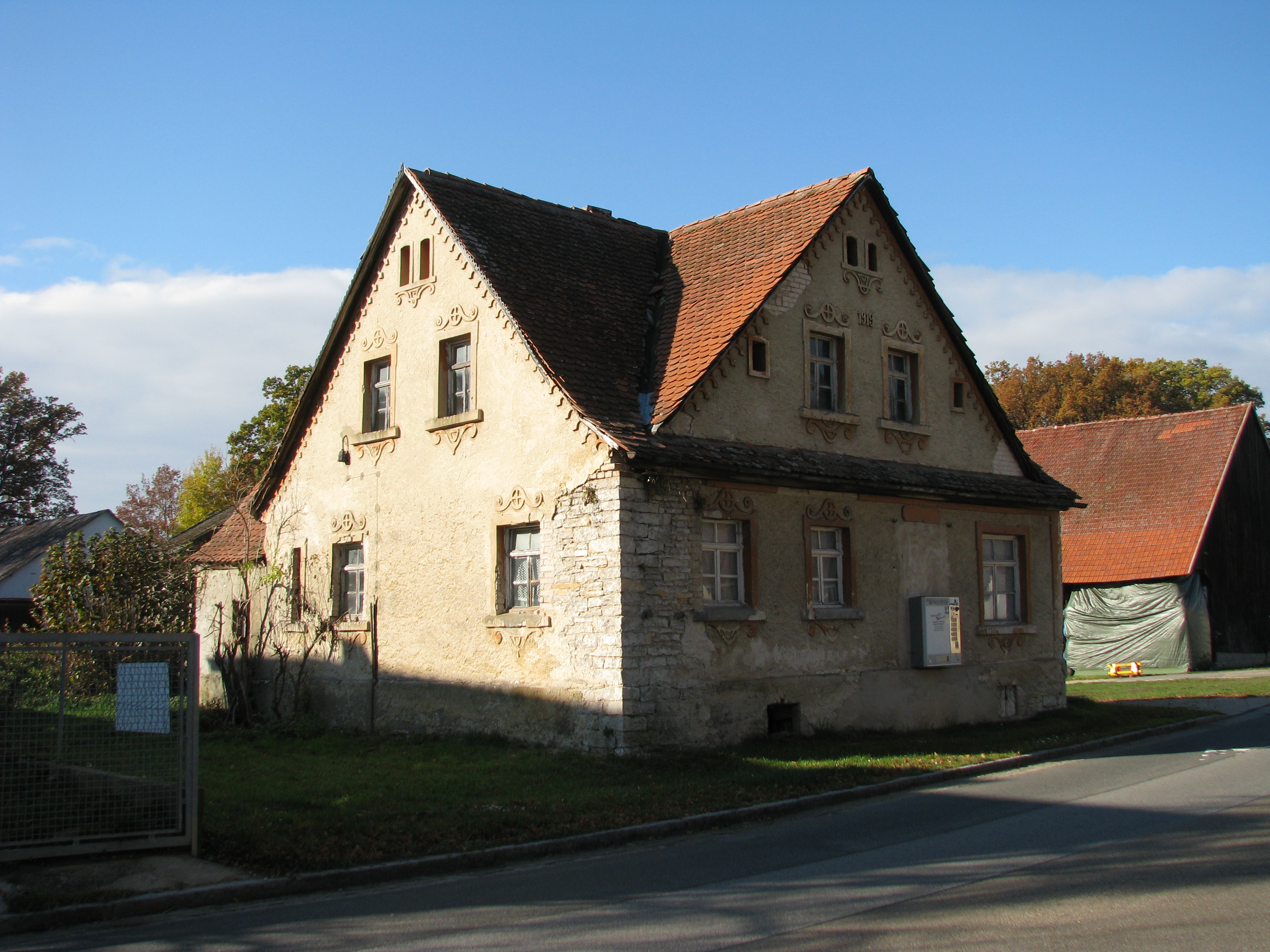 Schmellnricht, Ortsteil von Freystadt im Landkreis Neumarkt in der Oberpfalz, Bayern, Wohnhaus von 1919